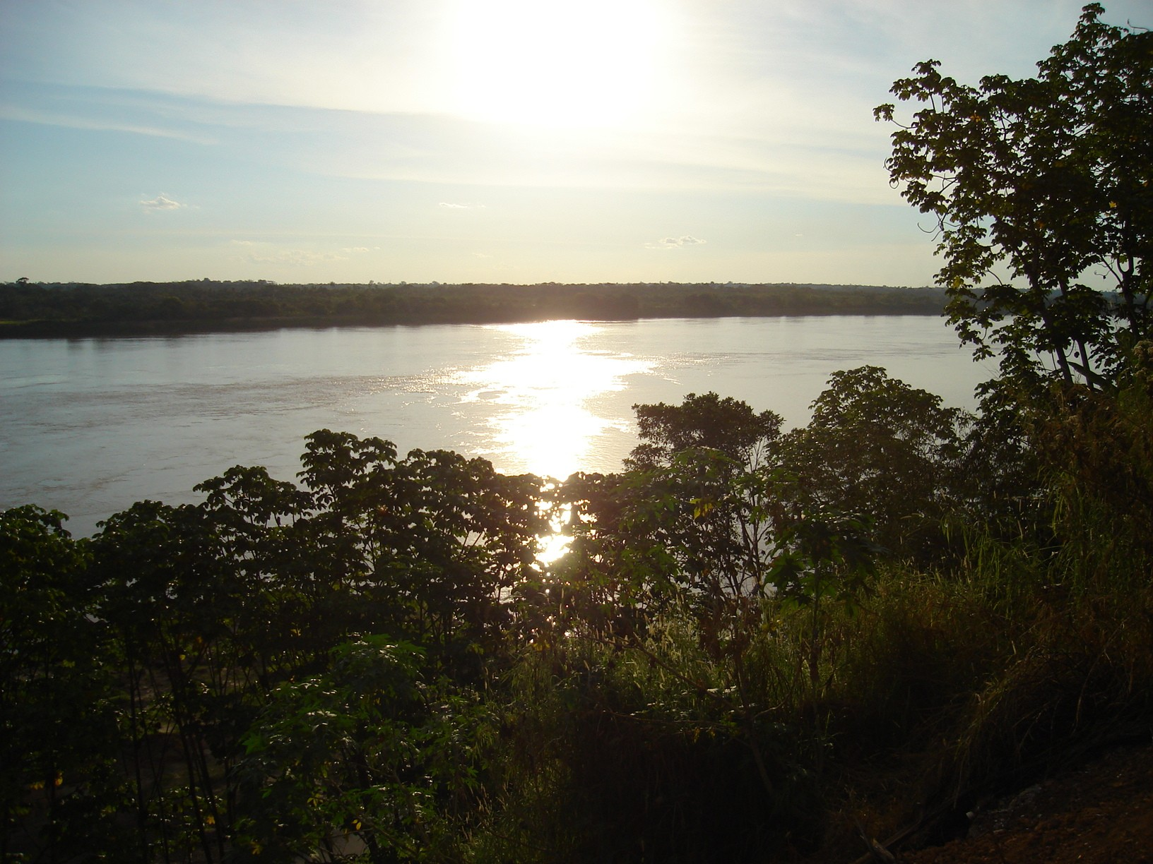 Pôr-do-sol no Rio Madeira em Porto Velho, Rondônia - Brasil.